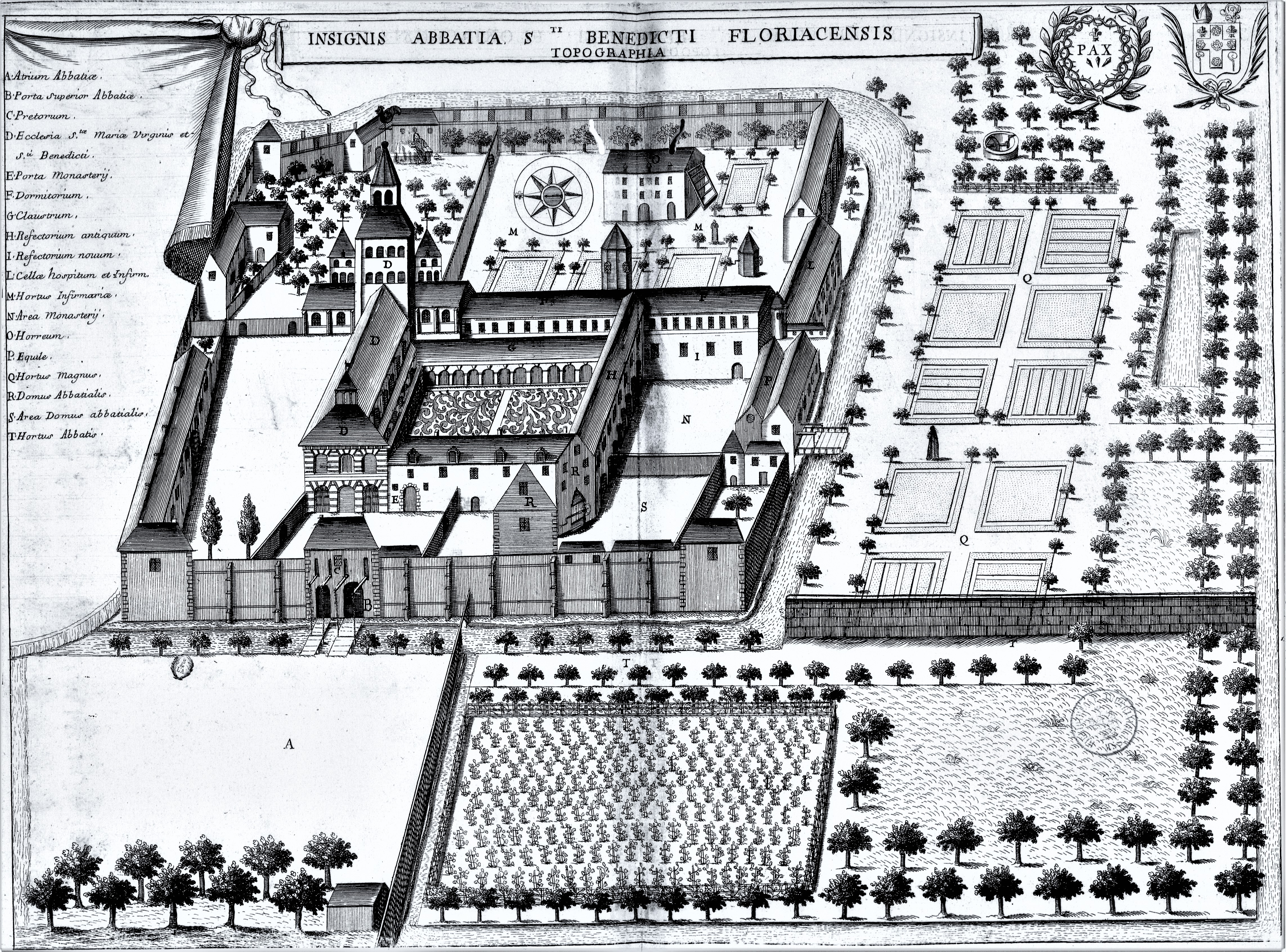 Planche gravée du 17ème siècle représentant l'abbaye de Saint-Benoît-sur-Loire, en France, dans le livre Monasticon Gallicanum.